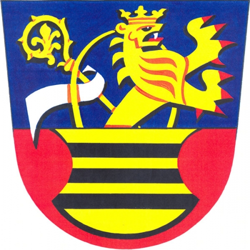 Znak, Janov, okres Svitavy